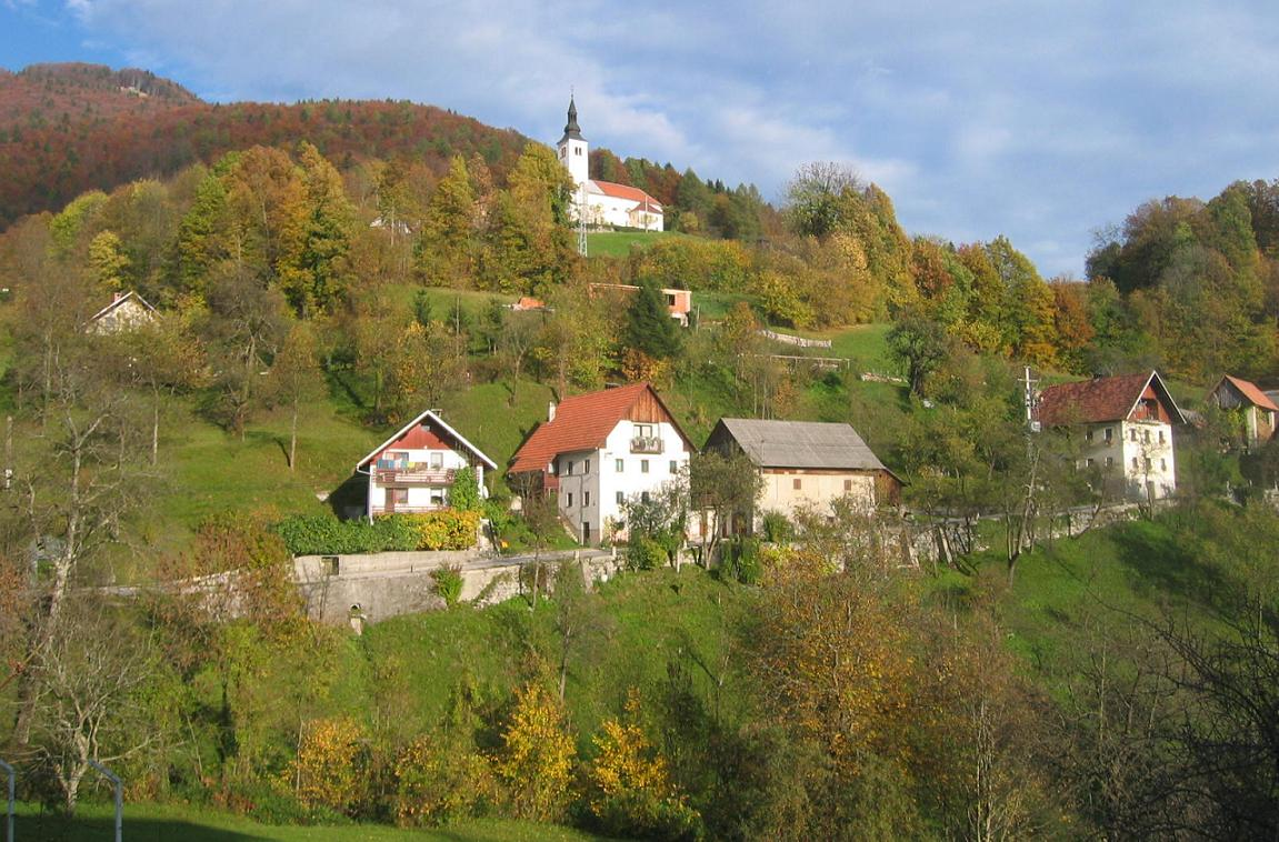 Dolenji Novaki, village near Cerkno, Slovenia photo:Ziga 18:41, 29 October 2006 (UTC)